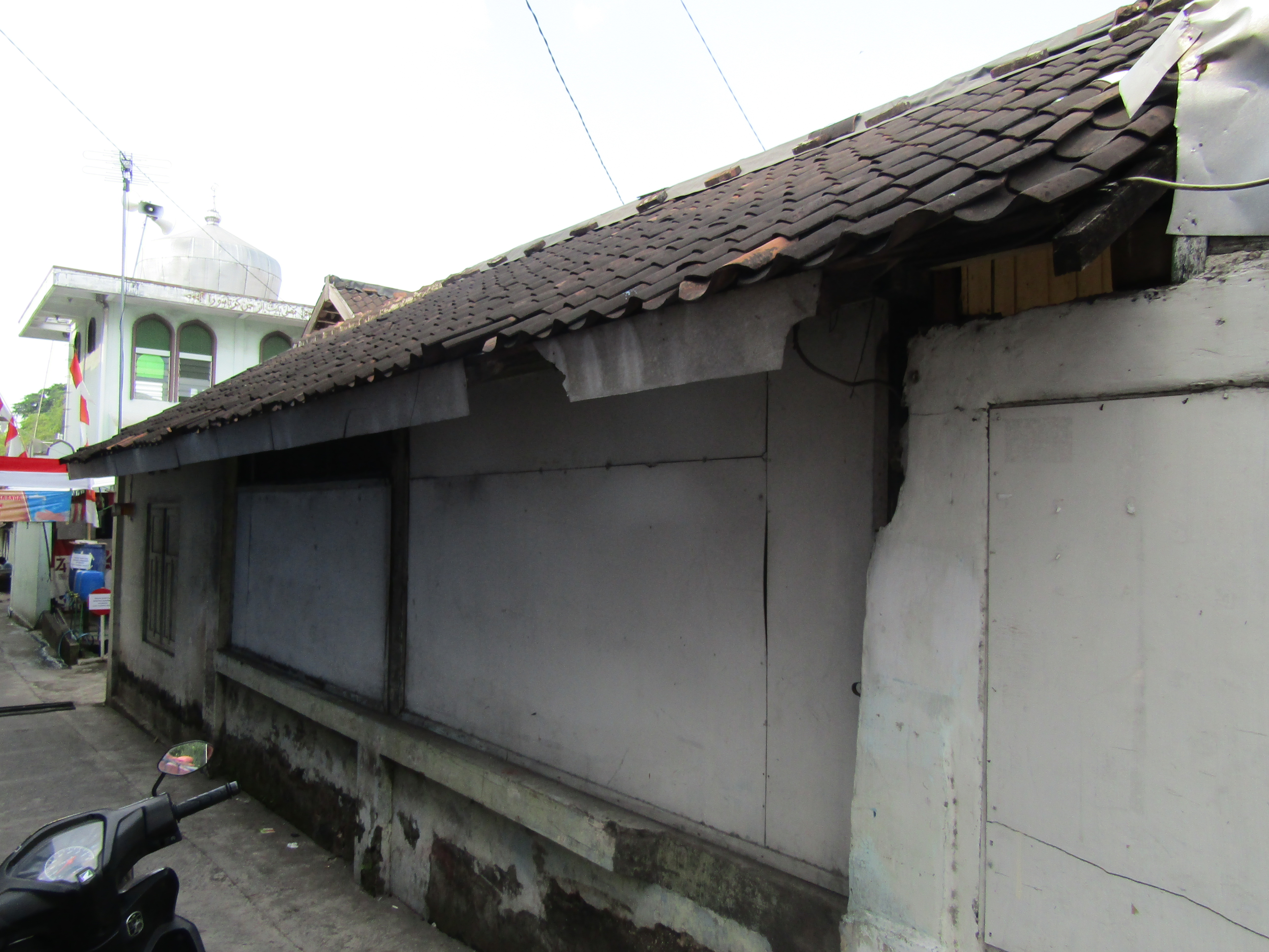 Tampak samping Stasiun Kartasura 2020. Kini jadi warung satai kambing.